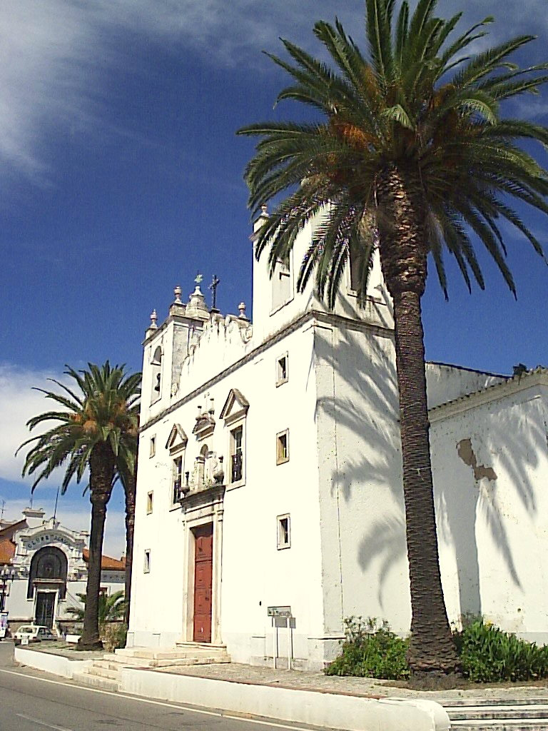 Igreja da Misericórdia, Chamusca, Portugal